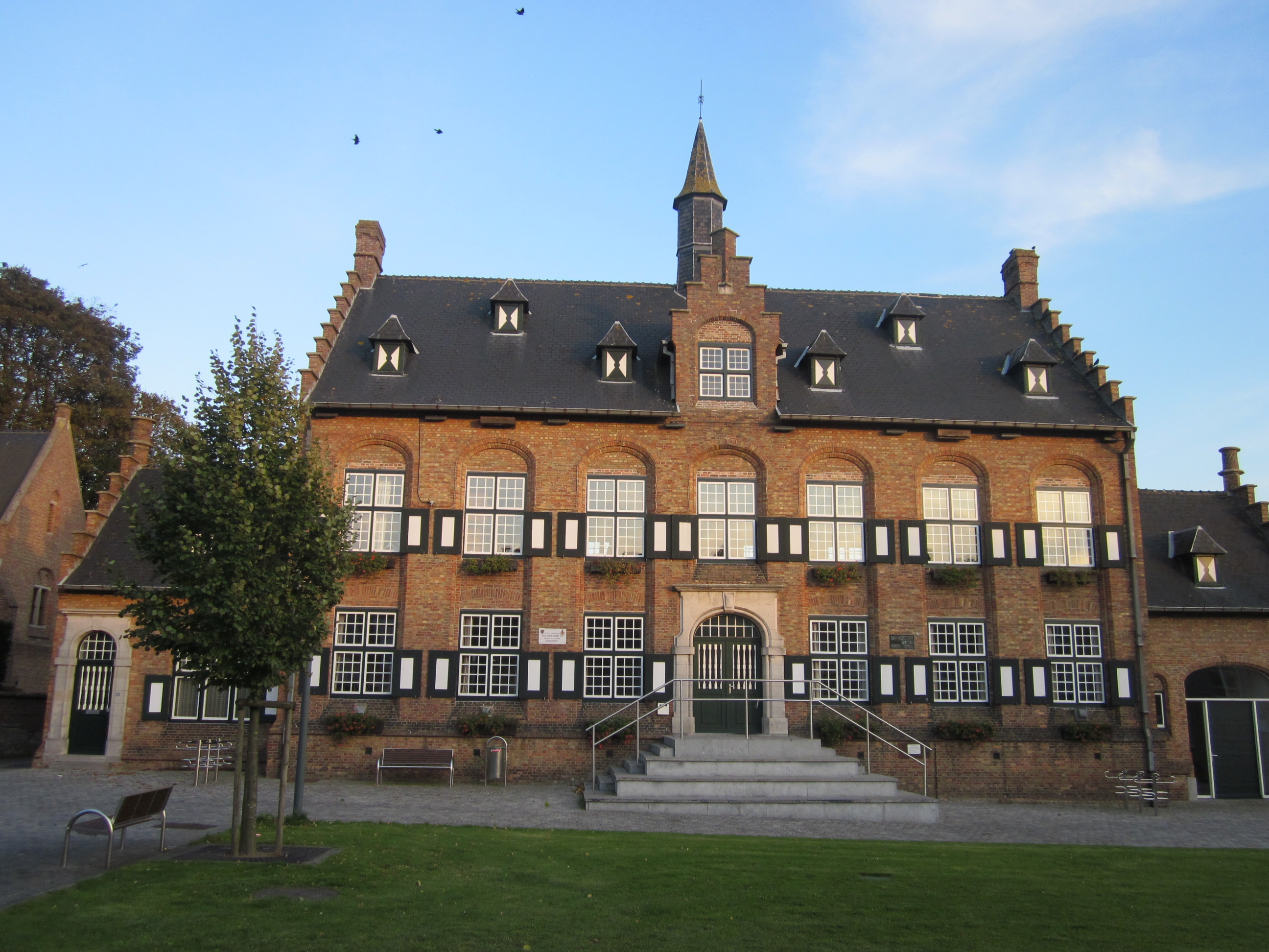 Voormalig gemeentehuis (1921) van Westrozebeke 49″ N, 3° 00′ 44.89″ E